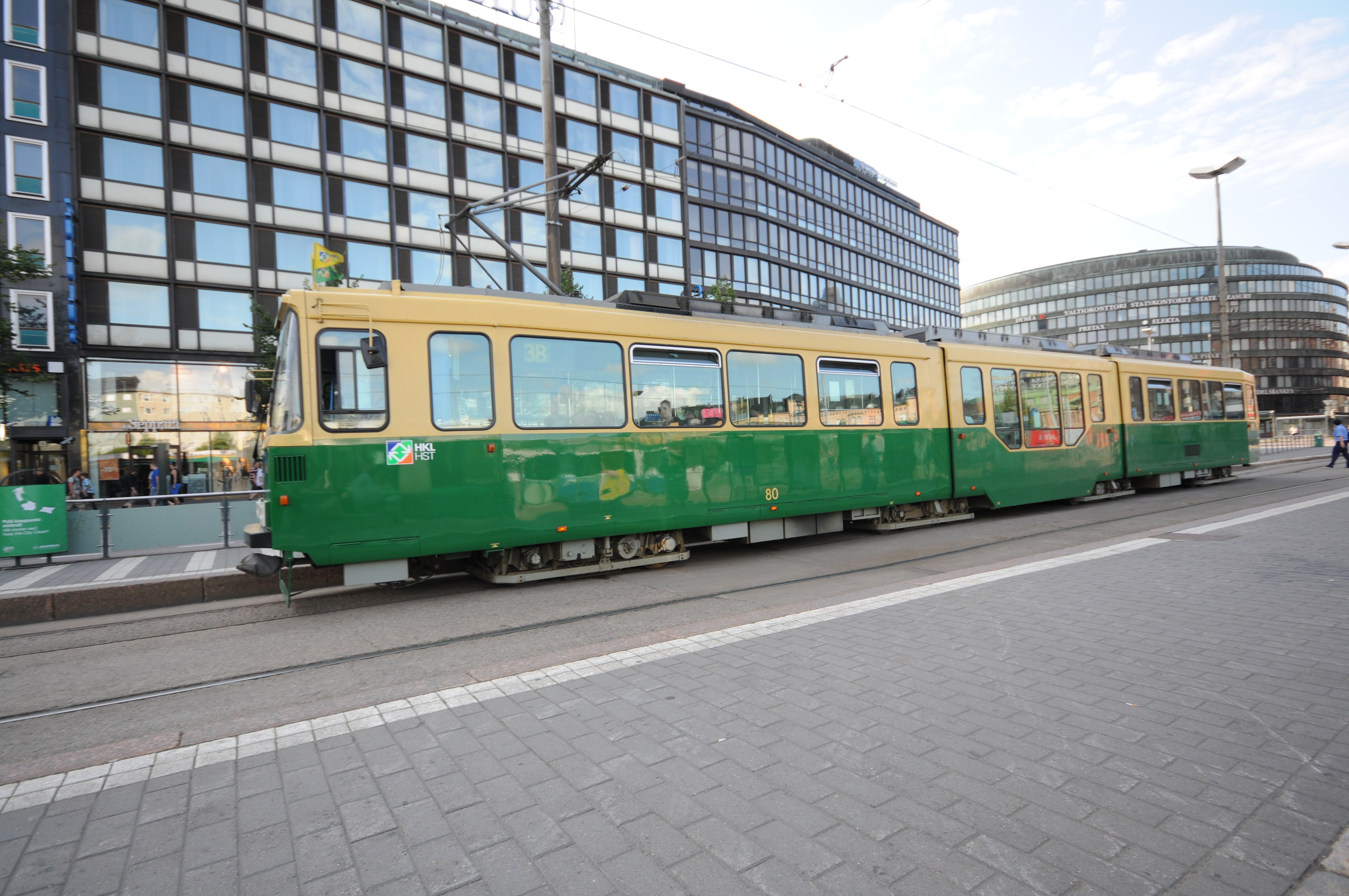 Helsinki